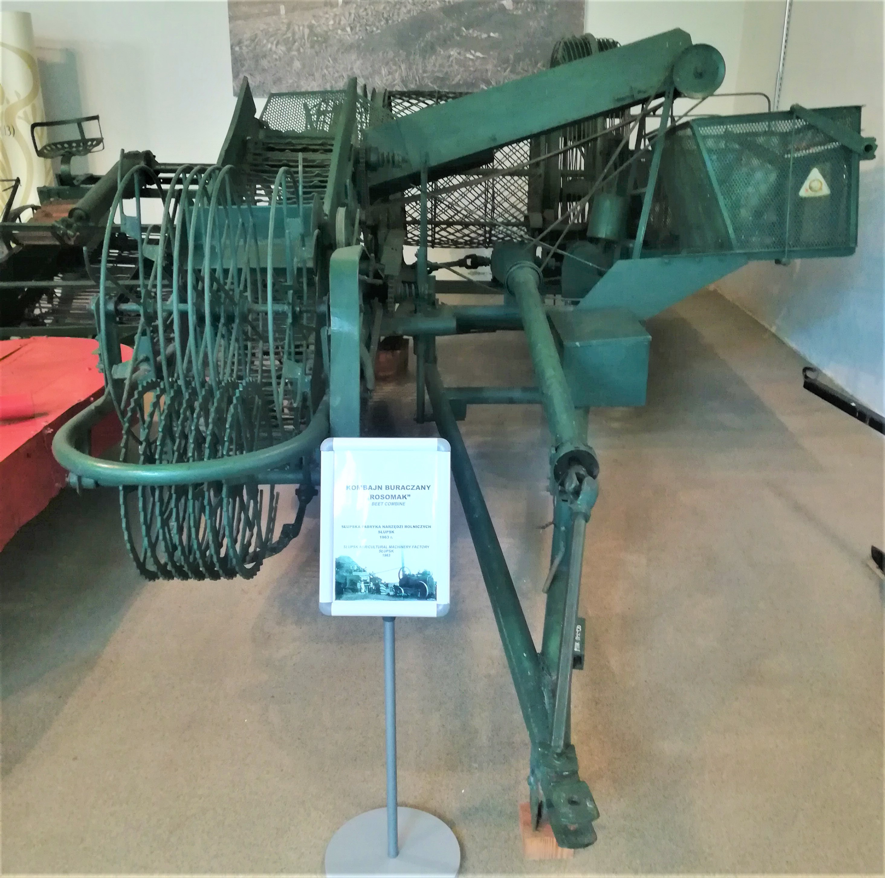 Polski kombajn buraczany KBC-1 Rosomak. Muzeum Rolnictw w Szreniawie.